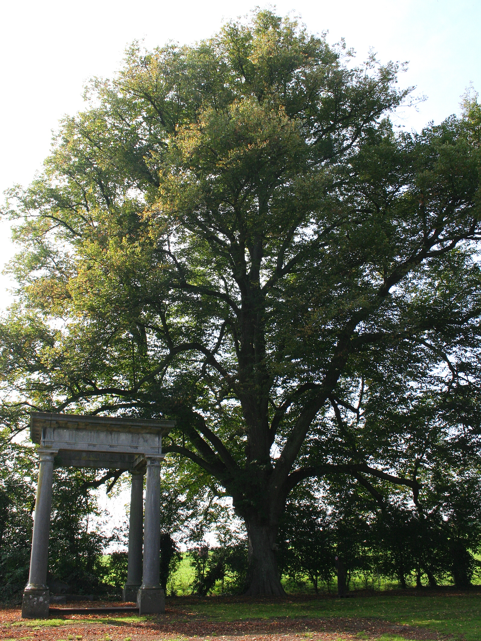 Fraiture (Belgique), tilleul remarquable de l’ancien parc du château – circonférence mesurée à 1m50 du sol: 385cm (2007).